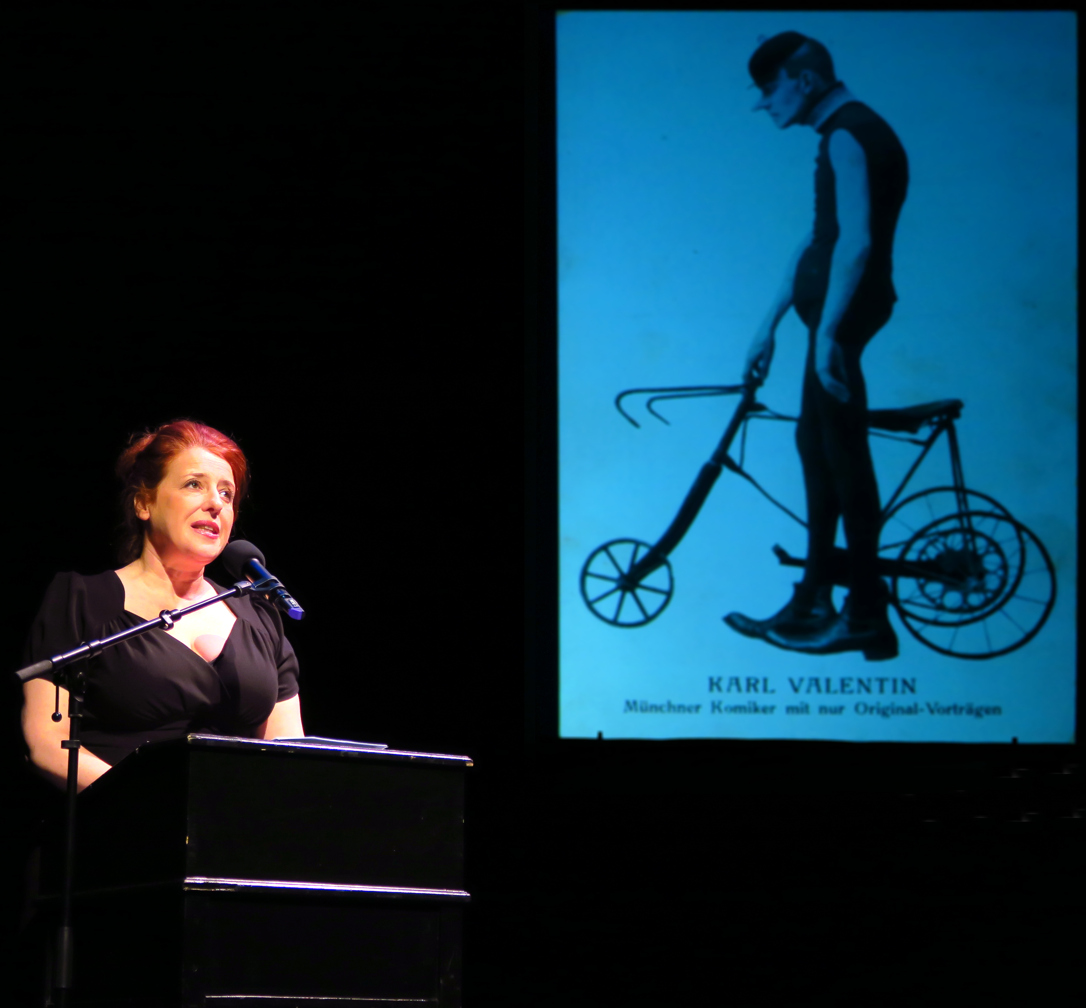 Luise Kinseher spricht die Laudatio auf den "Großen Karl-Valentin-Preisträger" Sigi Zimmerschied am 19. März 2017 im Münchner Volkstheater